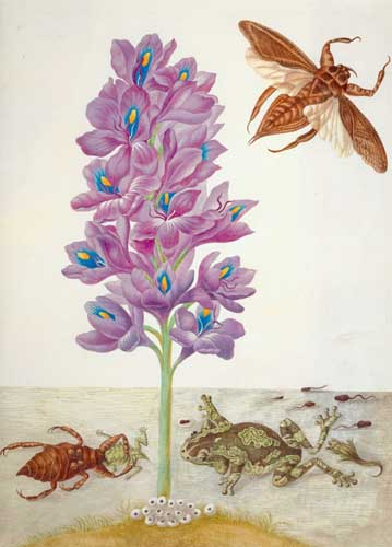 Wasserskorpion, Frösche, Kaulquappen und Wasserhyazinthe